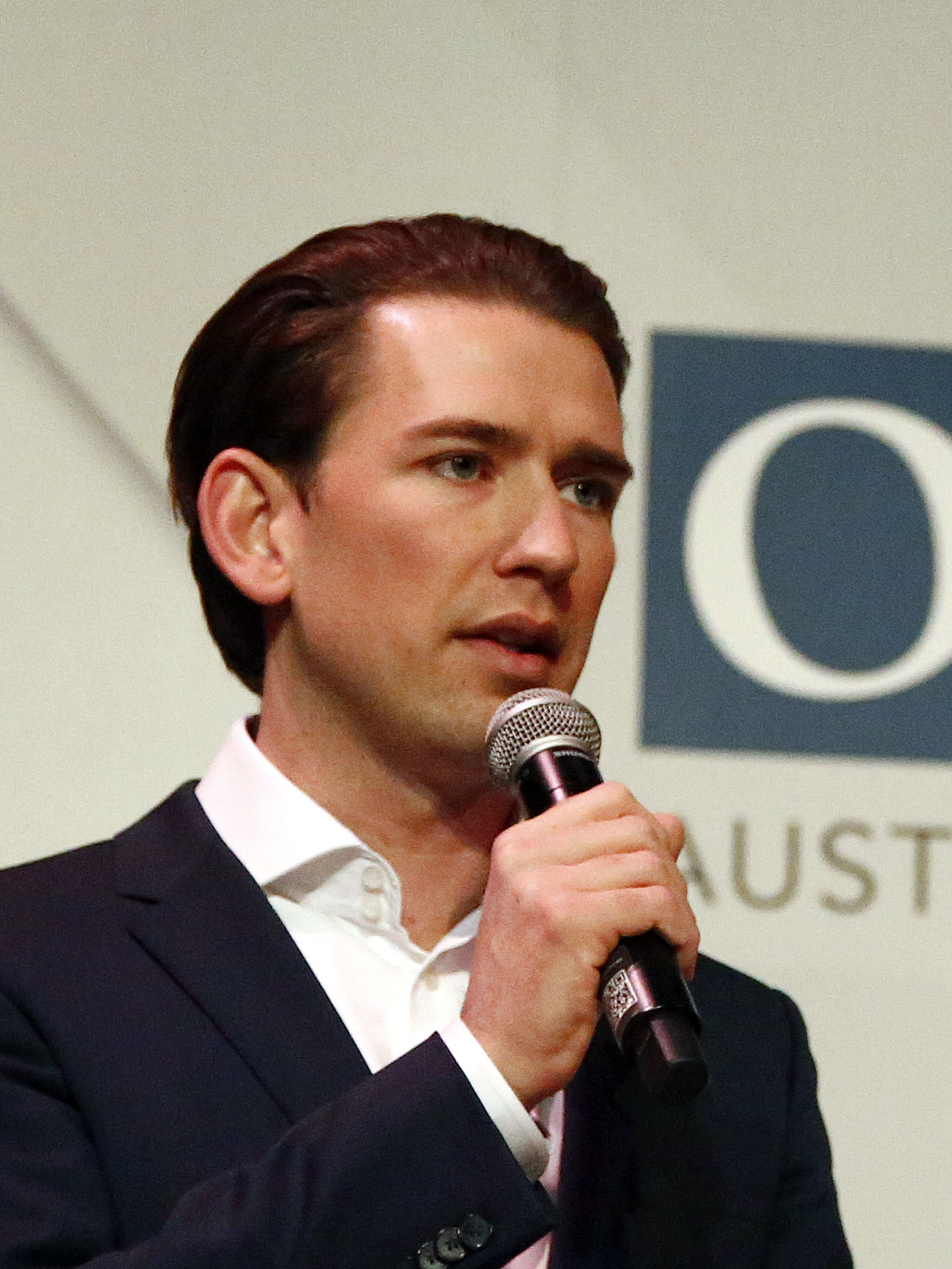 Sebastian Kurz am 12. Jänner 2017